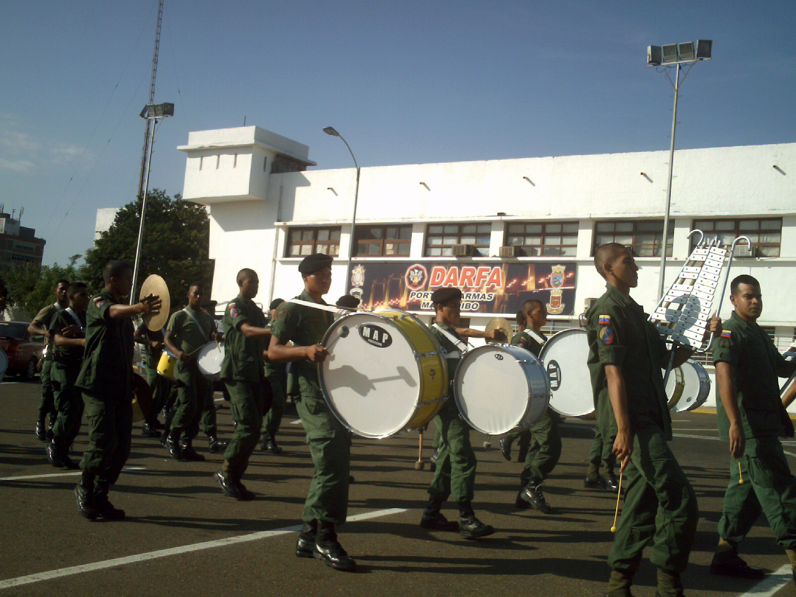 Banda en el Cuartel Libertador en Indio Mara, en Maracaibo, Edo. Zulia, Venezuela.